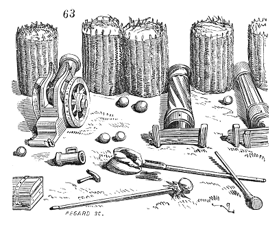 ... peu à peu on dut renoncer aux attaques brusquées et n'approcher des places ainsi munies qu'à couvert dans des boyaux de tranchée contournés dont les retours anguleux ou arrondis étaient défilés par des gabions remplis de terre et posés debout. Ces gros gabions servaient aussi à masquer les pièces en batterie